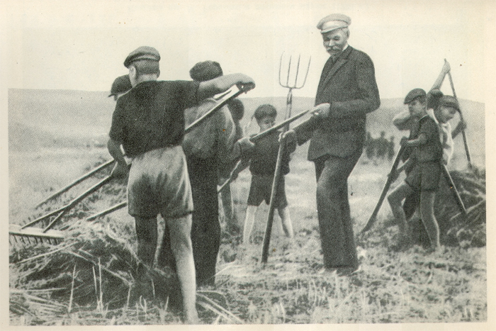 Фото Максима Горького, присутсвующего на сельхозработах колонистов.